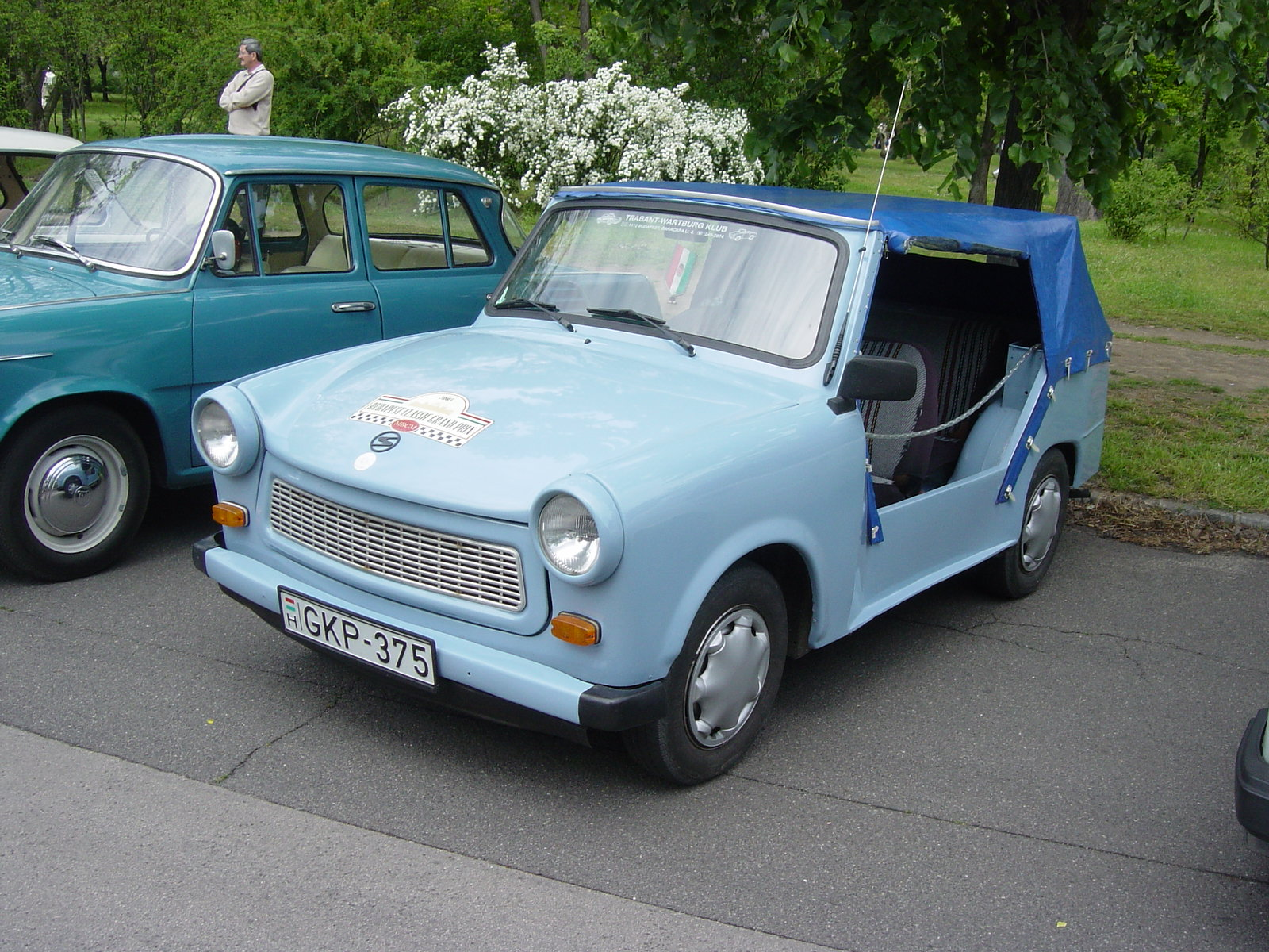 Blue Trabant 601 TRAMP at the Szocialista Jáműipar Gyöngyszemei 2008.